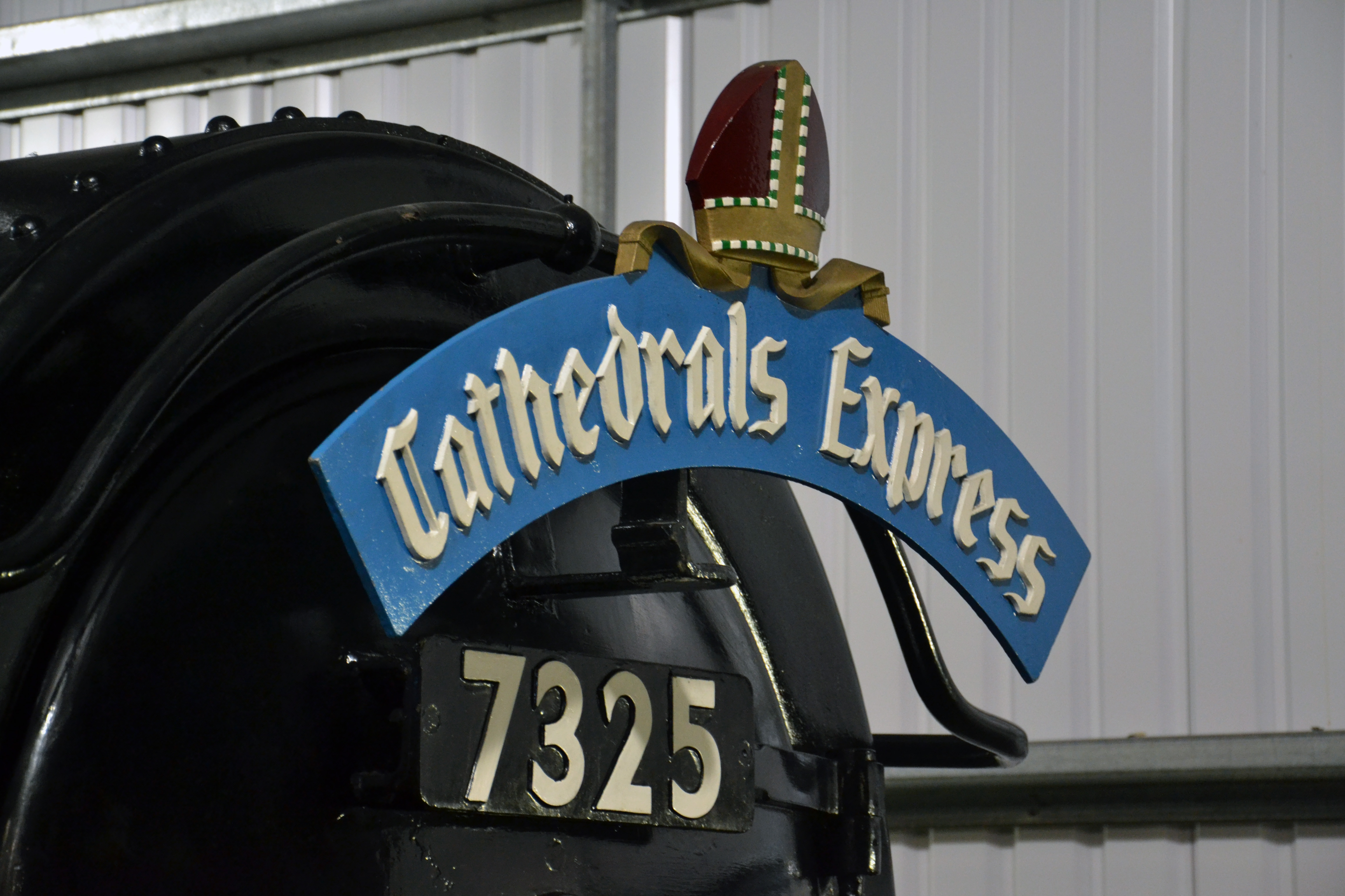 Severn Valley 1940's Weekend